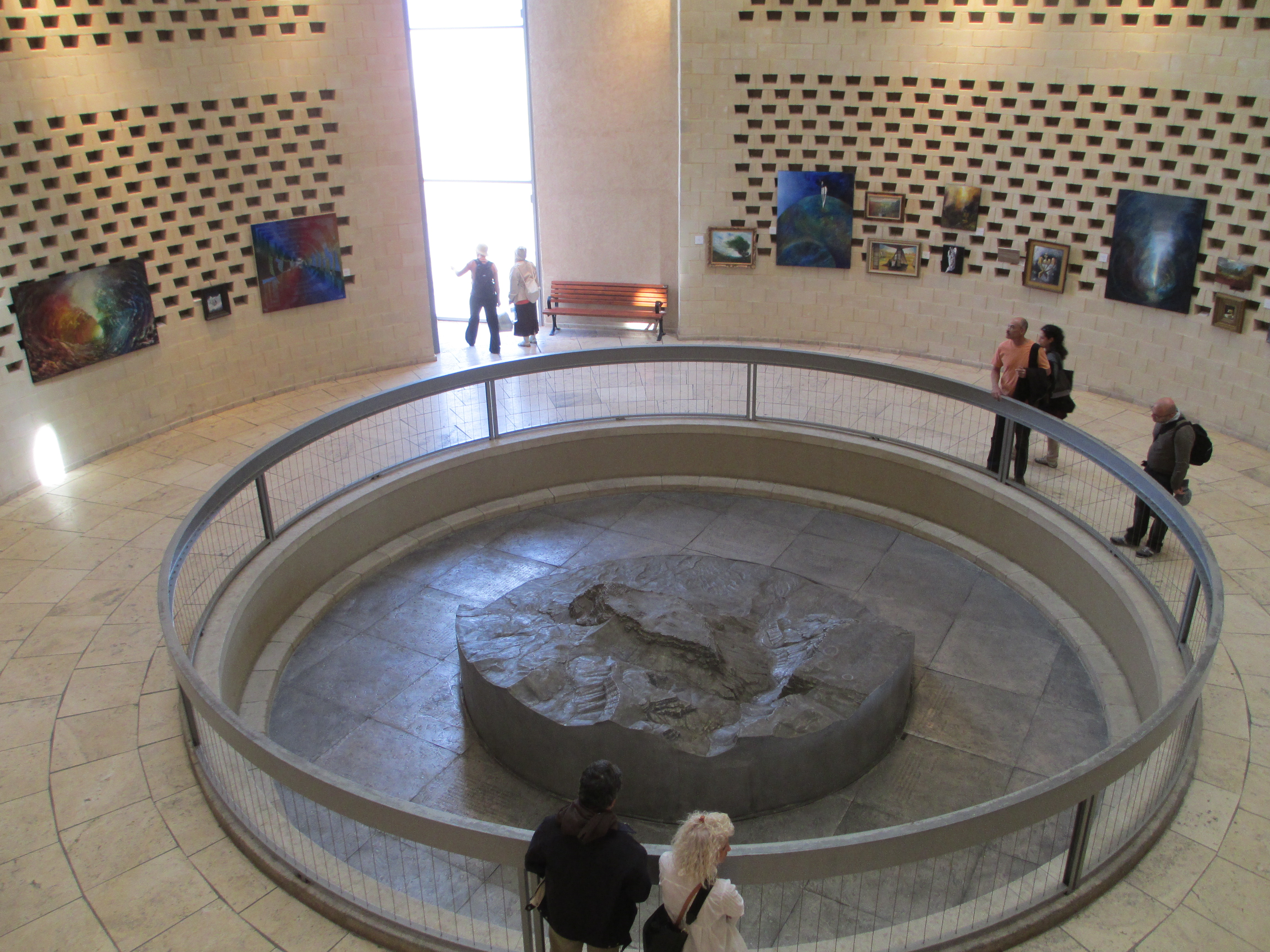 אולם המבואה במצדה